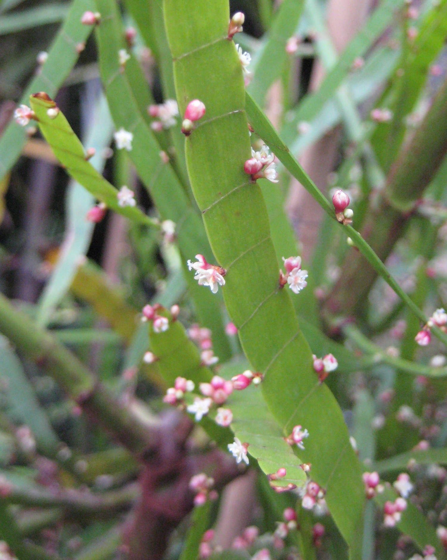 Homalocladium platycladum im Botanischen Garten Dresden